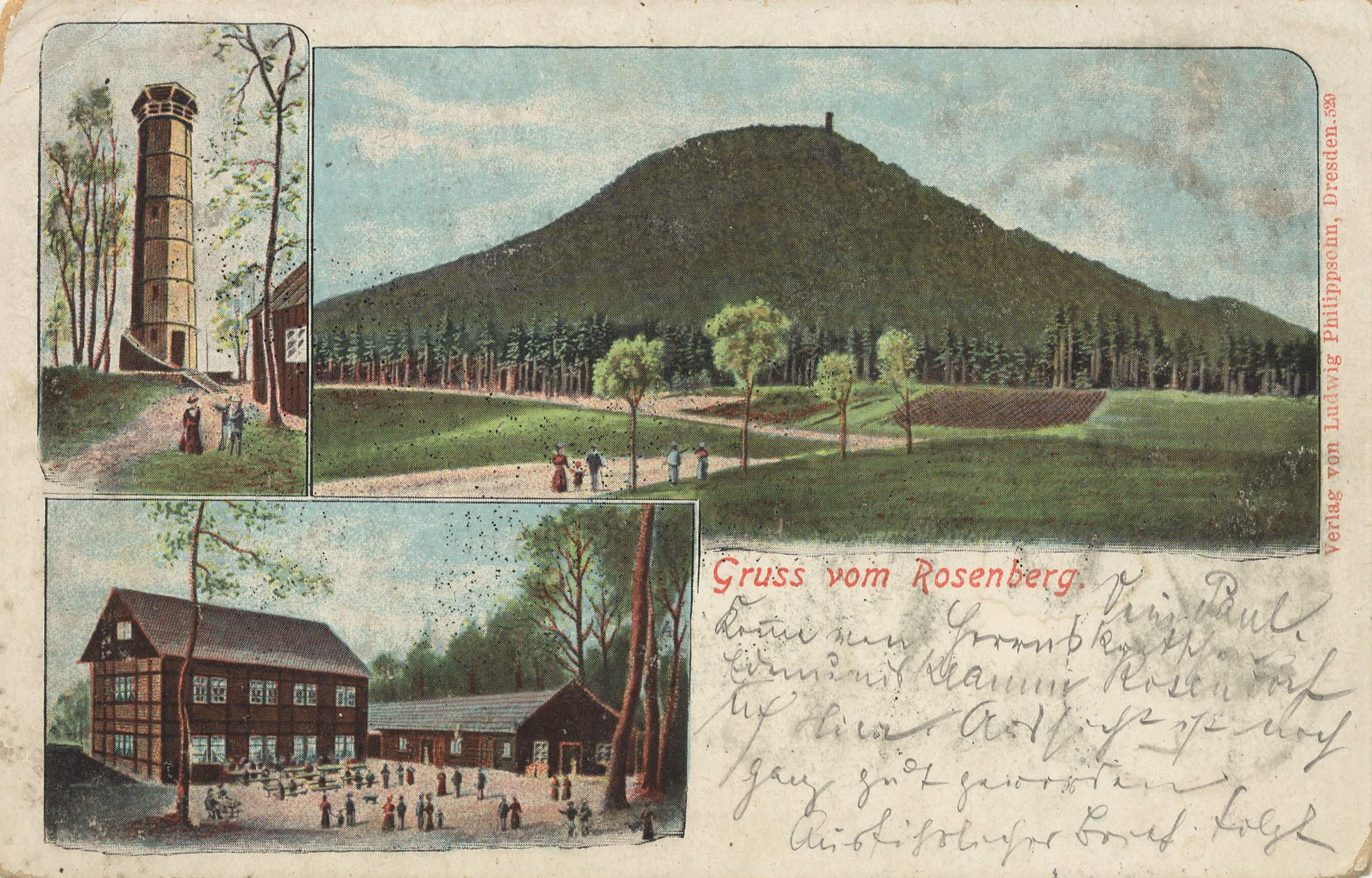 Rosenberg; Aussichtsturm; Gaststätte